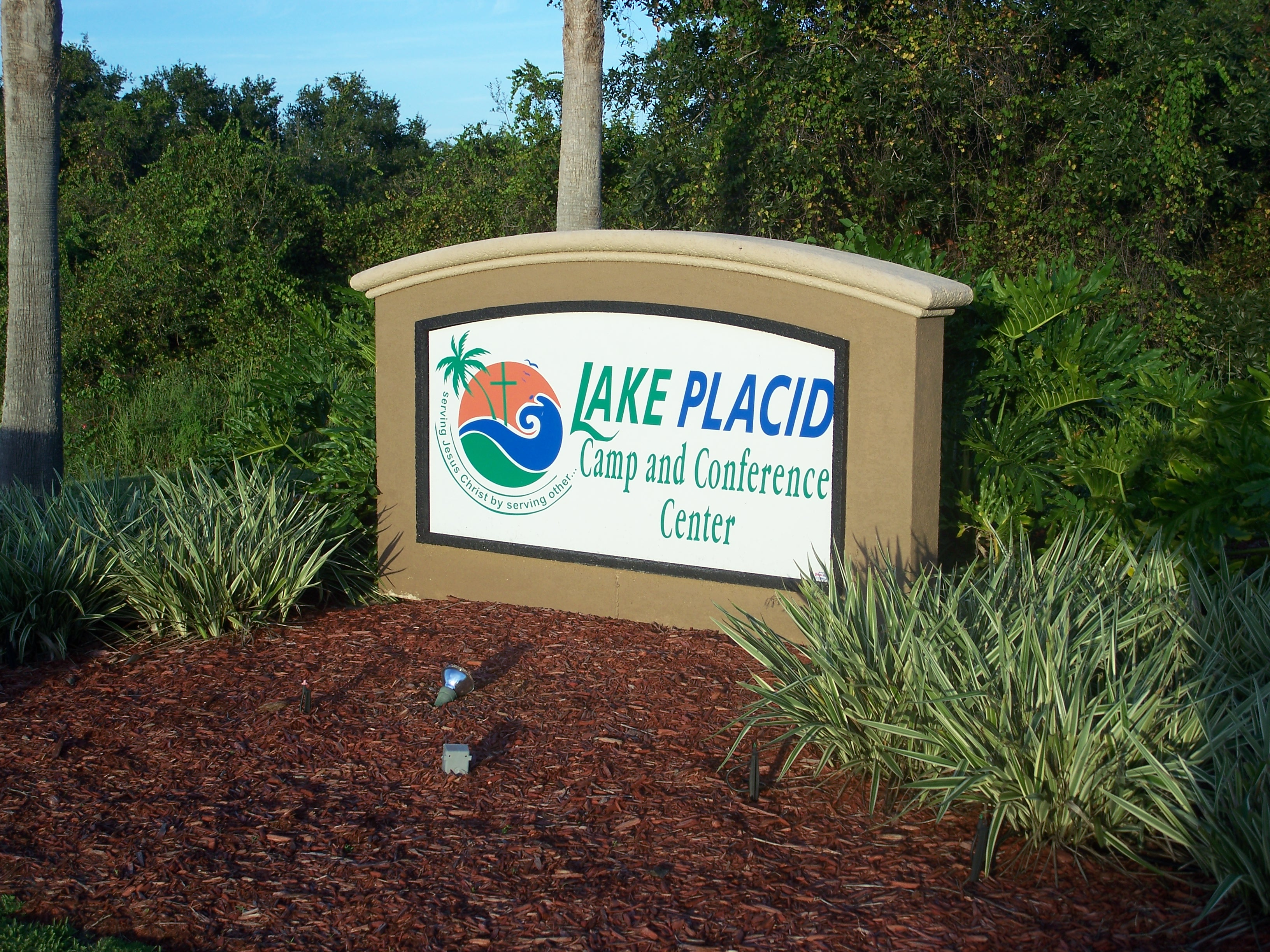 Lake Placid, Florida: Lake Placid Conference Center